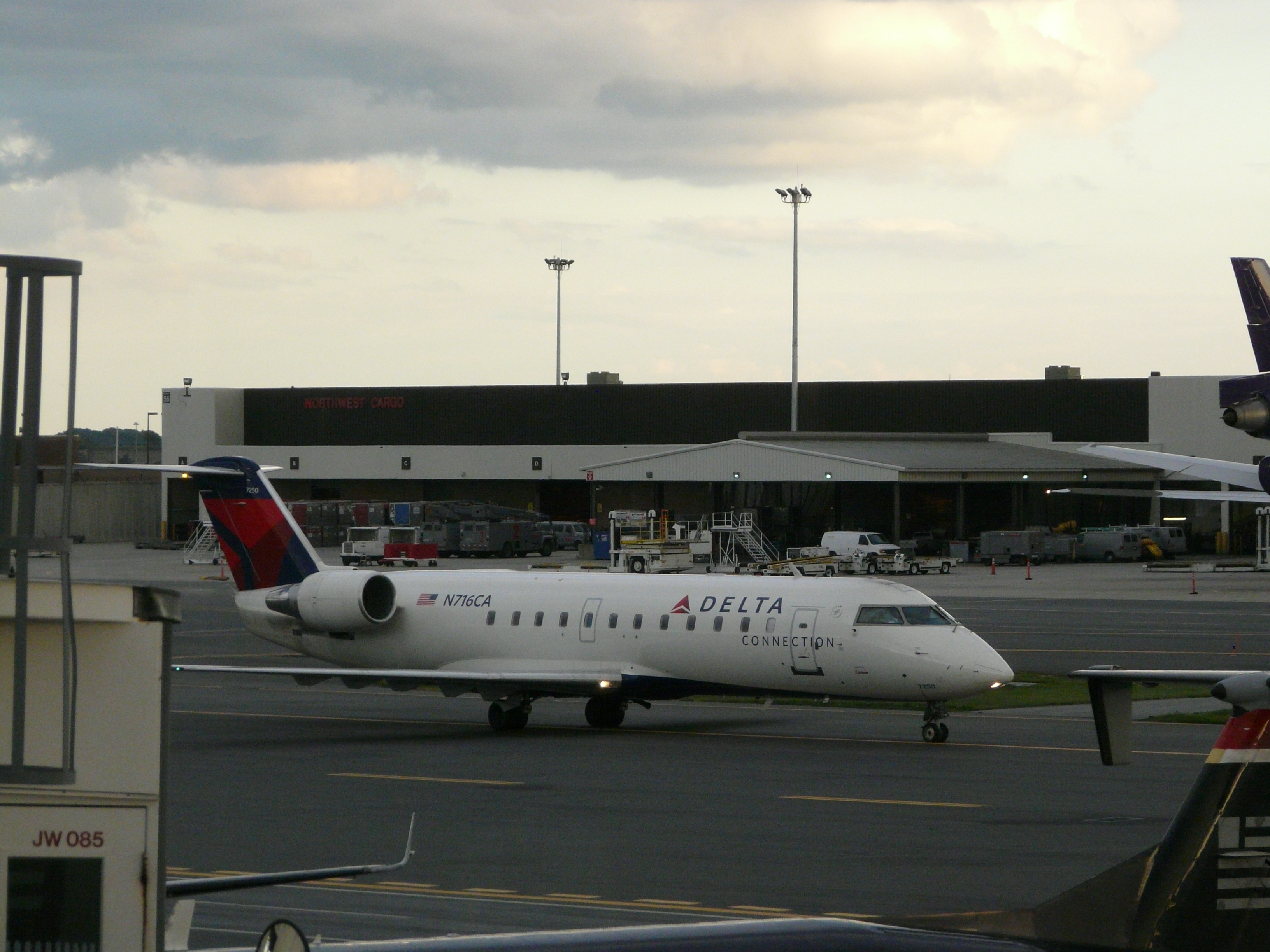 Boston